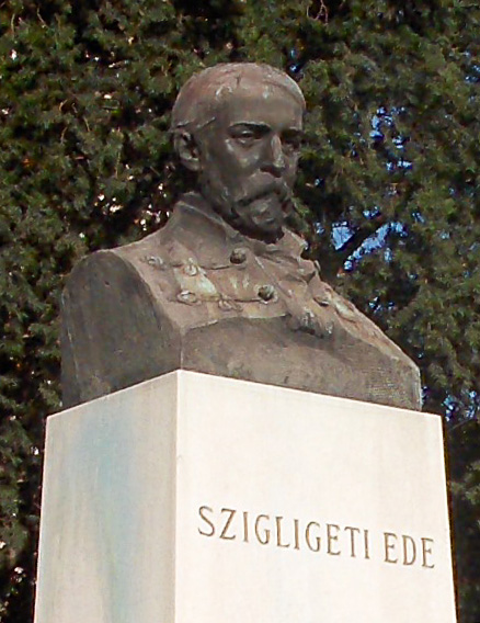 Szigligeti Ede színműíró mellszobra (Margó Ede, 1912). Az alkotást 1912. december 15-én avatták fel. 1921-ben áthelyezték egy másik térre, 1941-ben a bécsi döntést követően helyezték vissza eredeti helyére. - Románia, Nagyvárad (Oradea), Piata Regele Ferdinand a Nagyváradi Állami Színház épülete előtt áll.